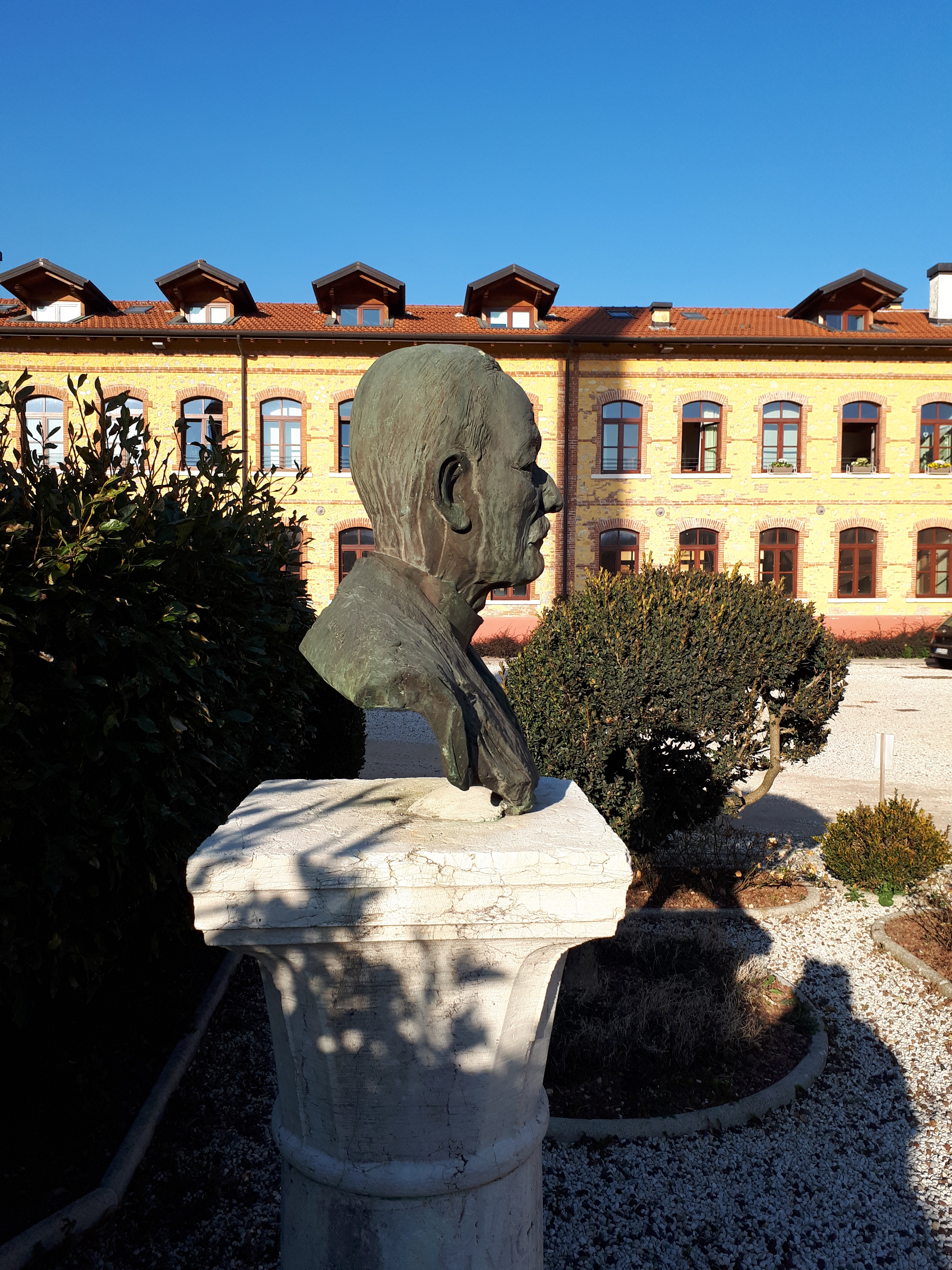 Il busto dedicato a Luigi Cazzola posto nel cortile interno del lanificio Cazzola